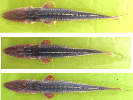 Pseudoscaphirhynchus hermanni